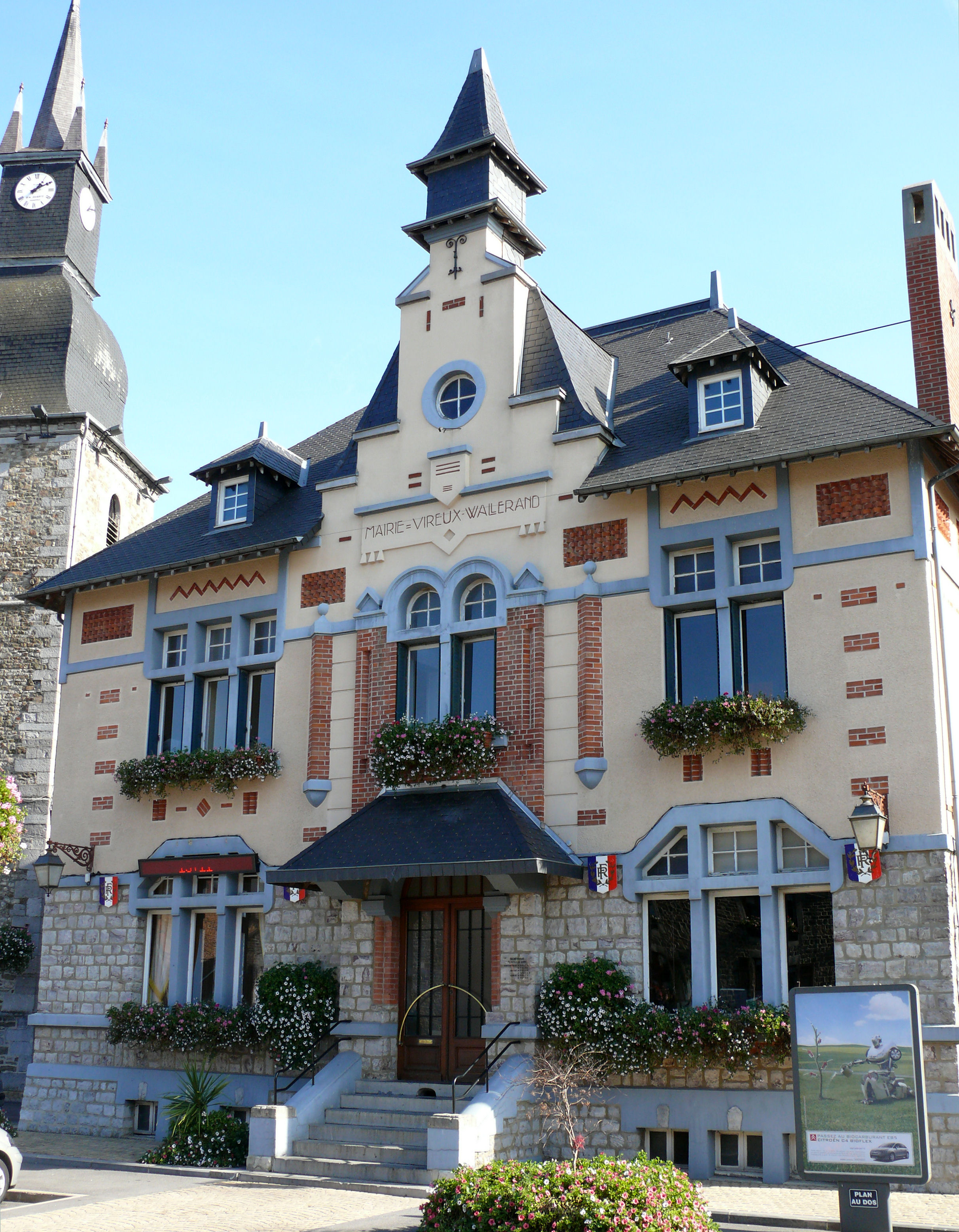 Vireux-Wallerand - Hôtel de ville